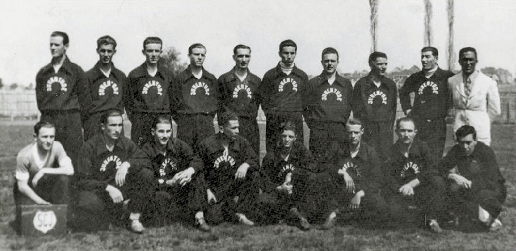 Equipe do Esporte Clube Juventude de Caxias do Sul campeã do Citadino em 1938, 1939, 1940 e 1941. Somente foi identificado com segurança Alcides Longhi, o quinto na fila de trás, contando da esquerda para a direita.